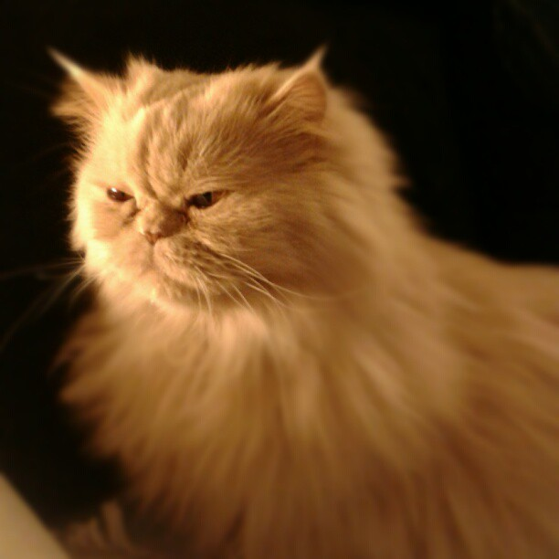 Mi gato Rayo, un Persa sin la mutación.